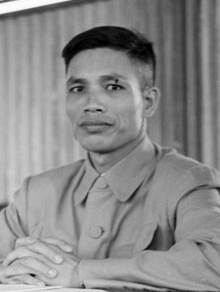 Il capo di stato maggiore del Viet Minh, generale Van Tien Dung, durante la conferenza del Tonchino nel 1954 al termine della guerra d'Indocina